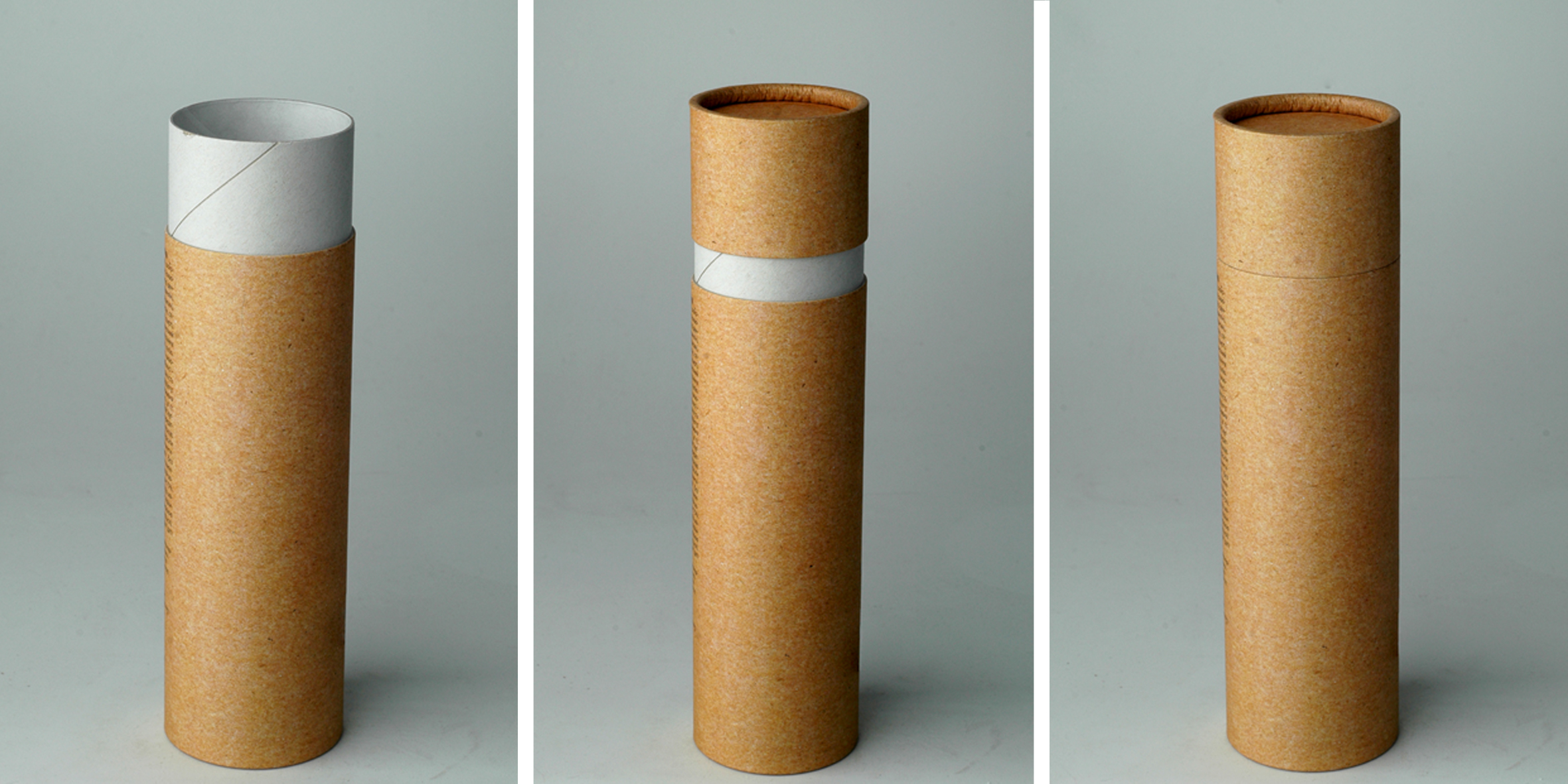 картонні тубуси